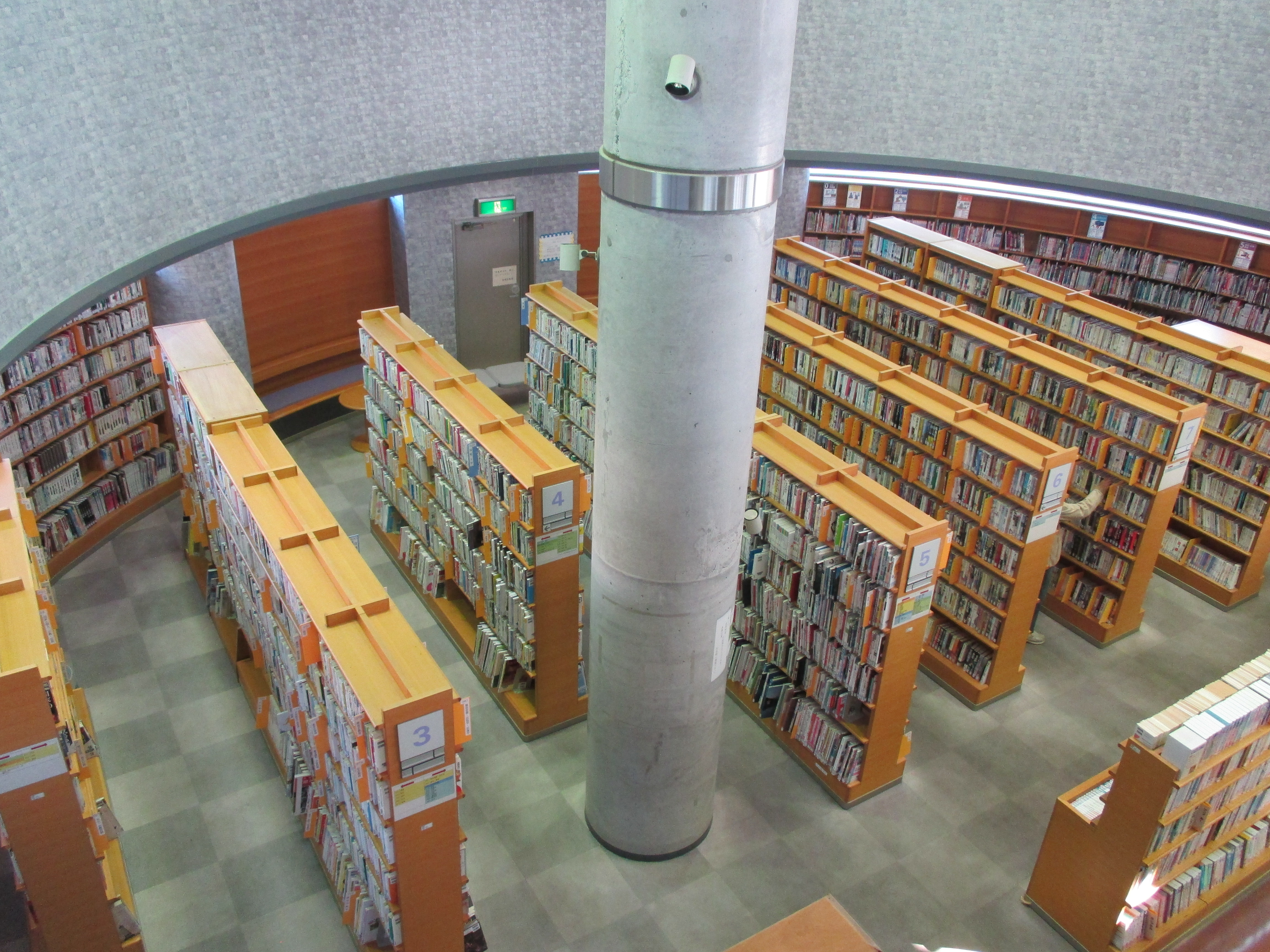 箕郷図書館の一般図書開架